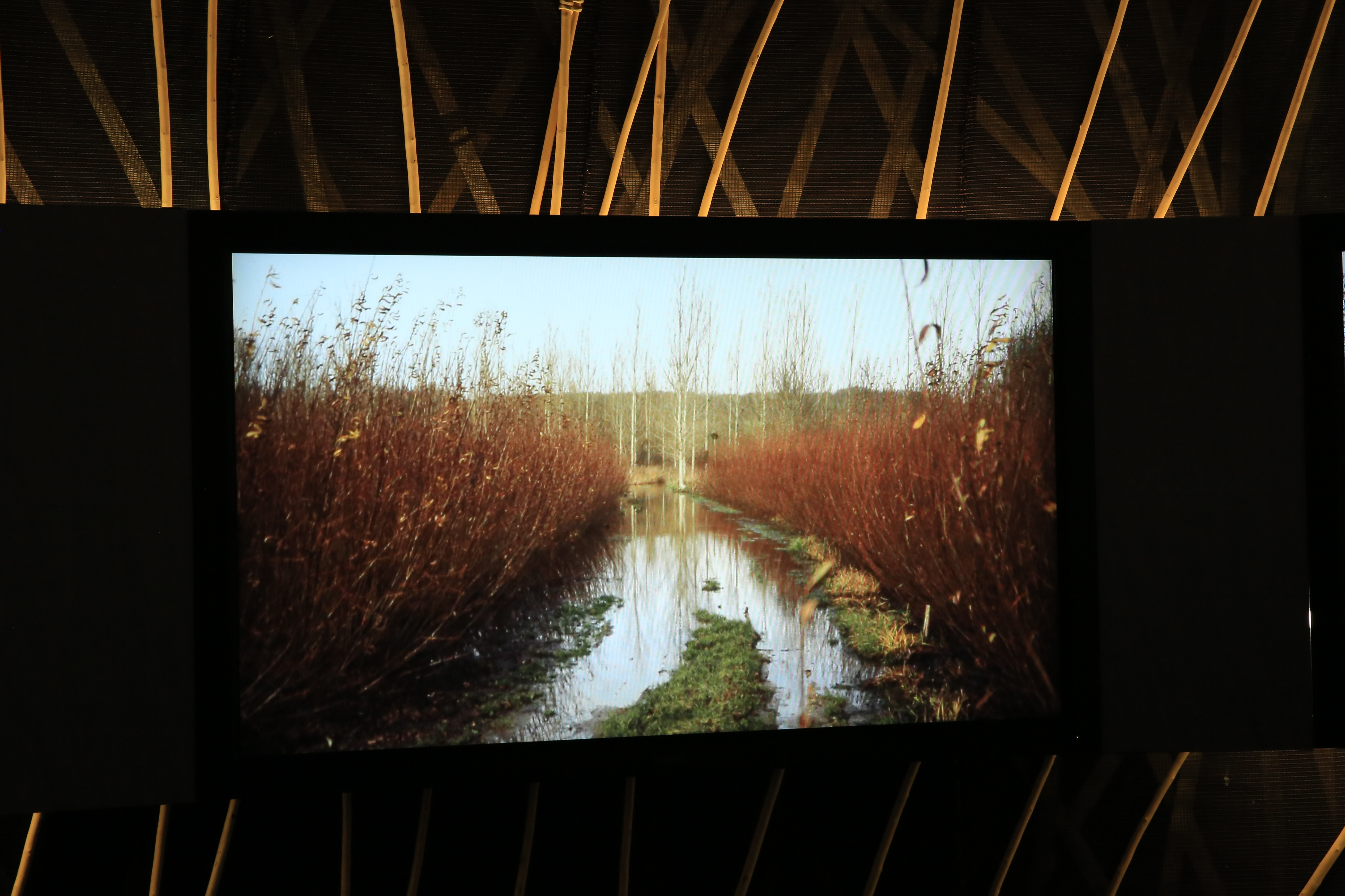 Musée de l'osier et de la vannerie à Villaines-les-Rochers : oseraies.